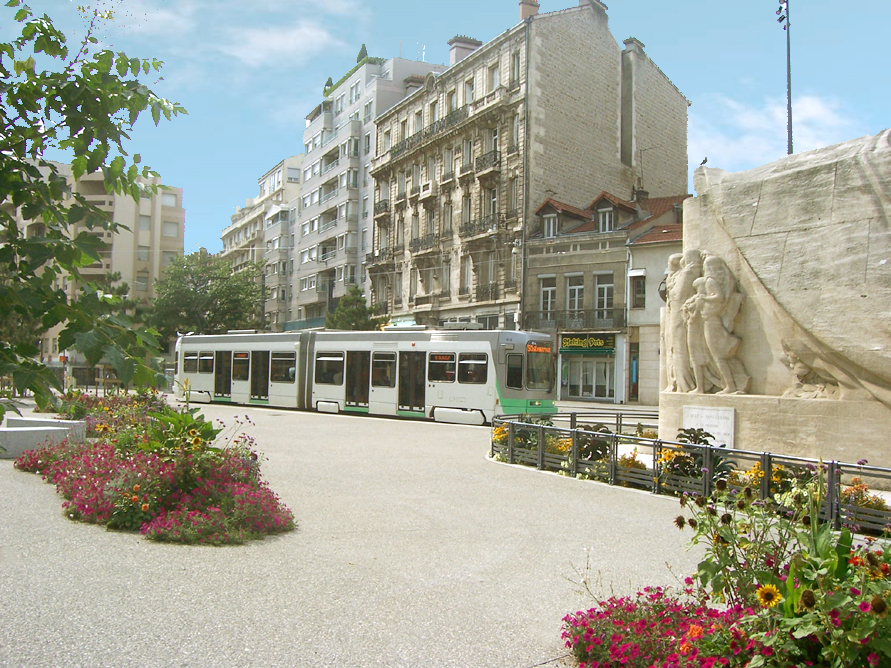 tramway de St Etienne (ligne 5) place Fourneyron